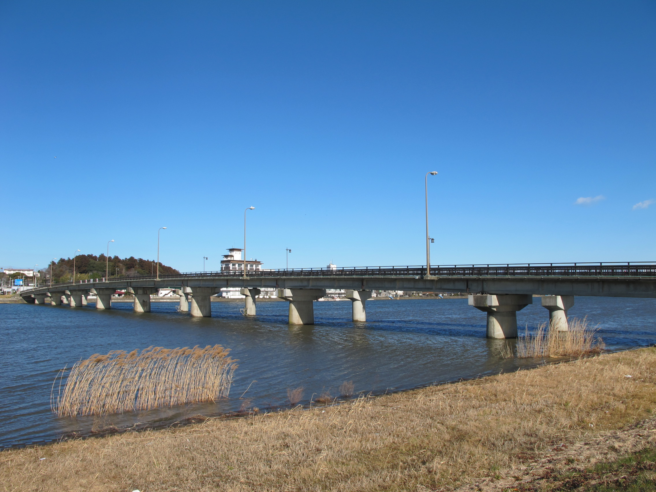 潮来大橋（茨城県道・千葉県道101号潮来佐原線）